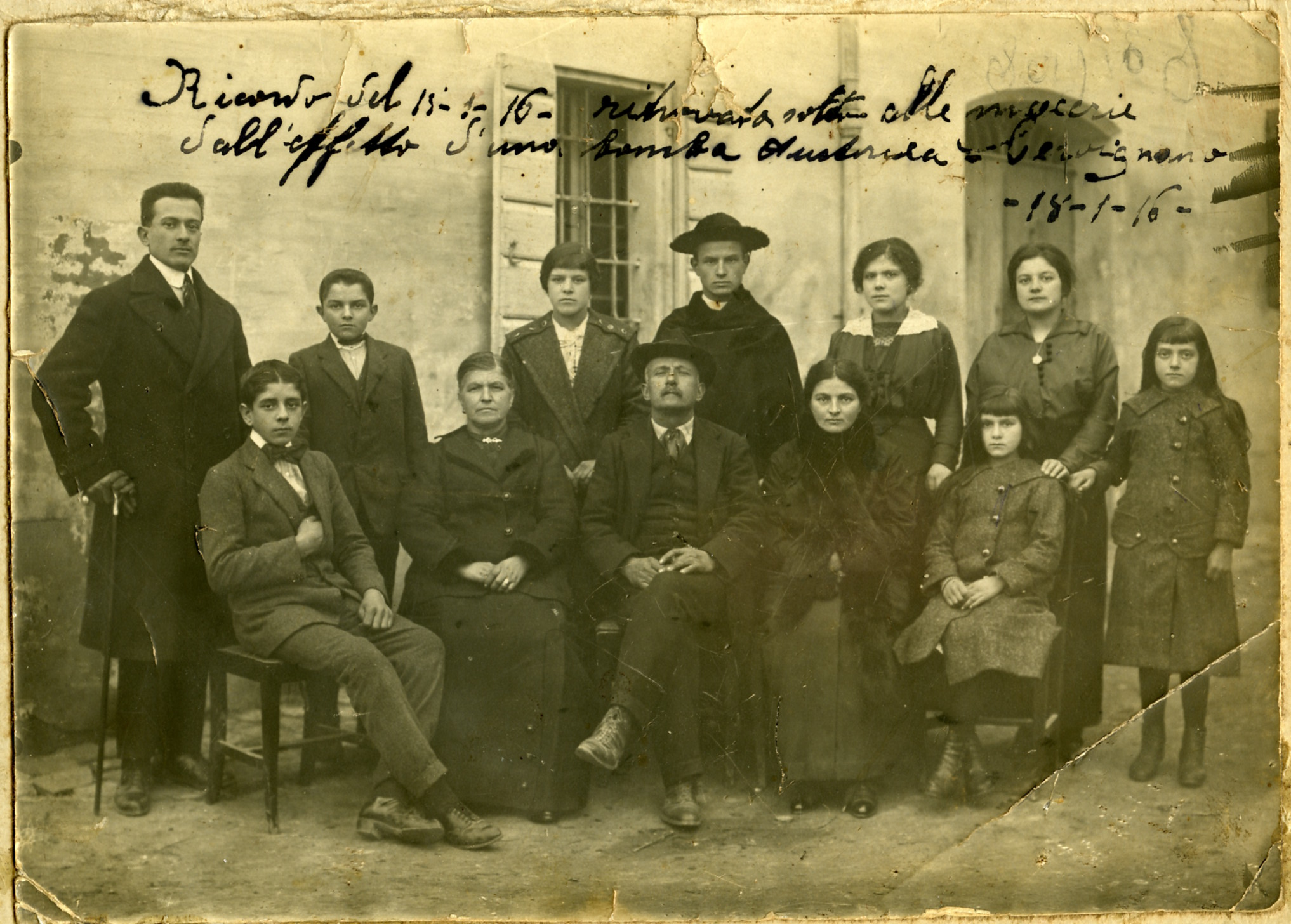 La famiglia di don Zeno Saltini nel 1916 "Ricordo del 15-01-16 ritrovata sotto alle macerie / dall'effetto d'una bomba Austriaca (?) -18-1-16